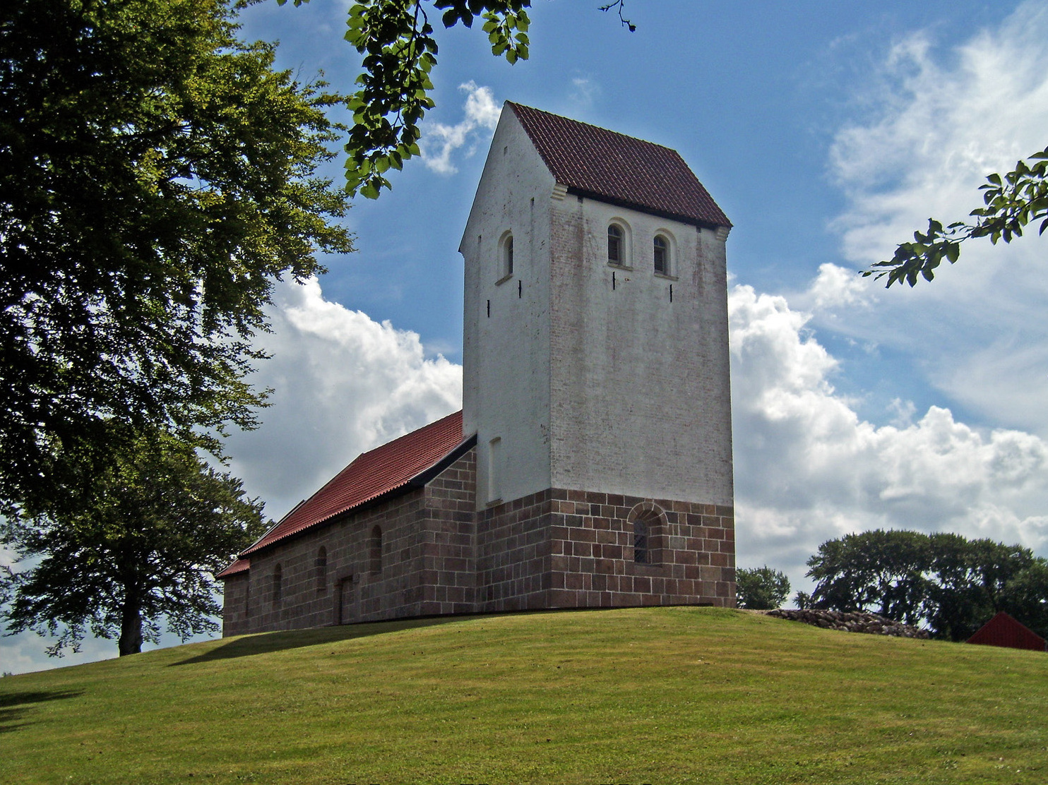 fra nordvest